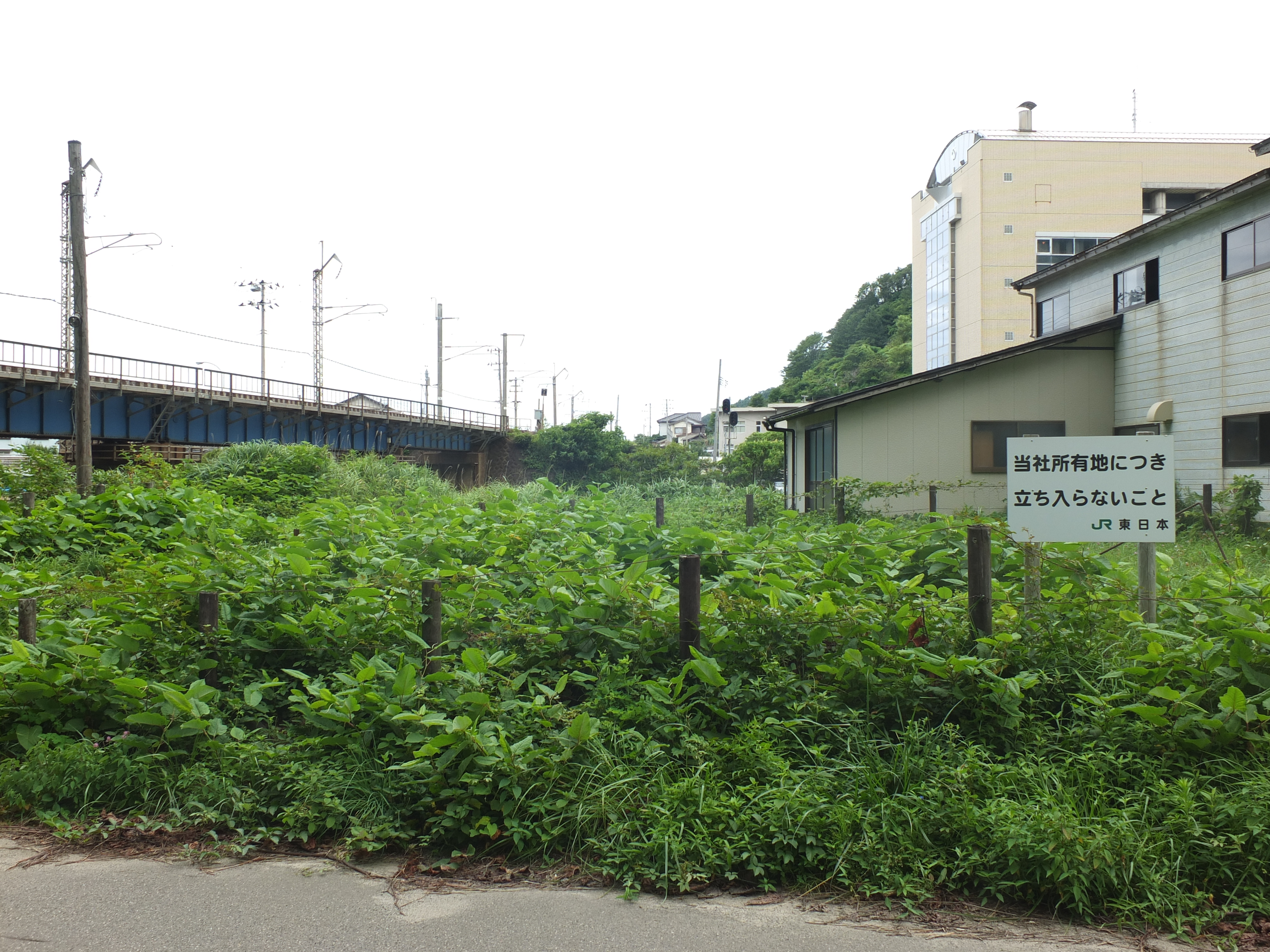 羽越本線 小岩川駅-あつみ温泉駅間の新線予定地にある（新）温海川橋梁架橋予定地